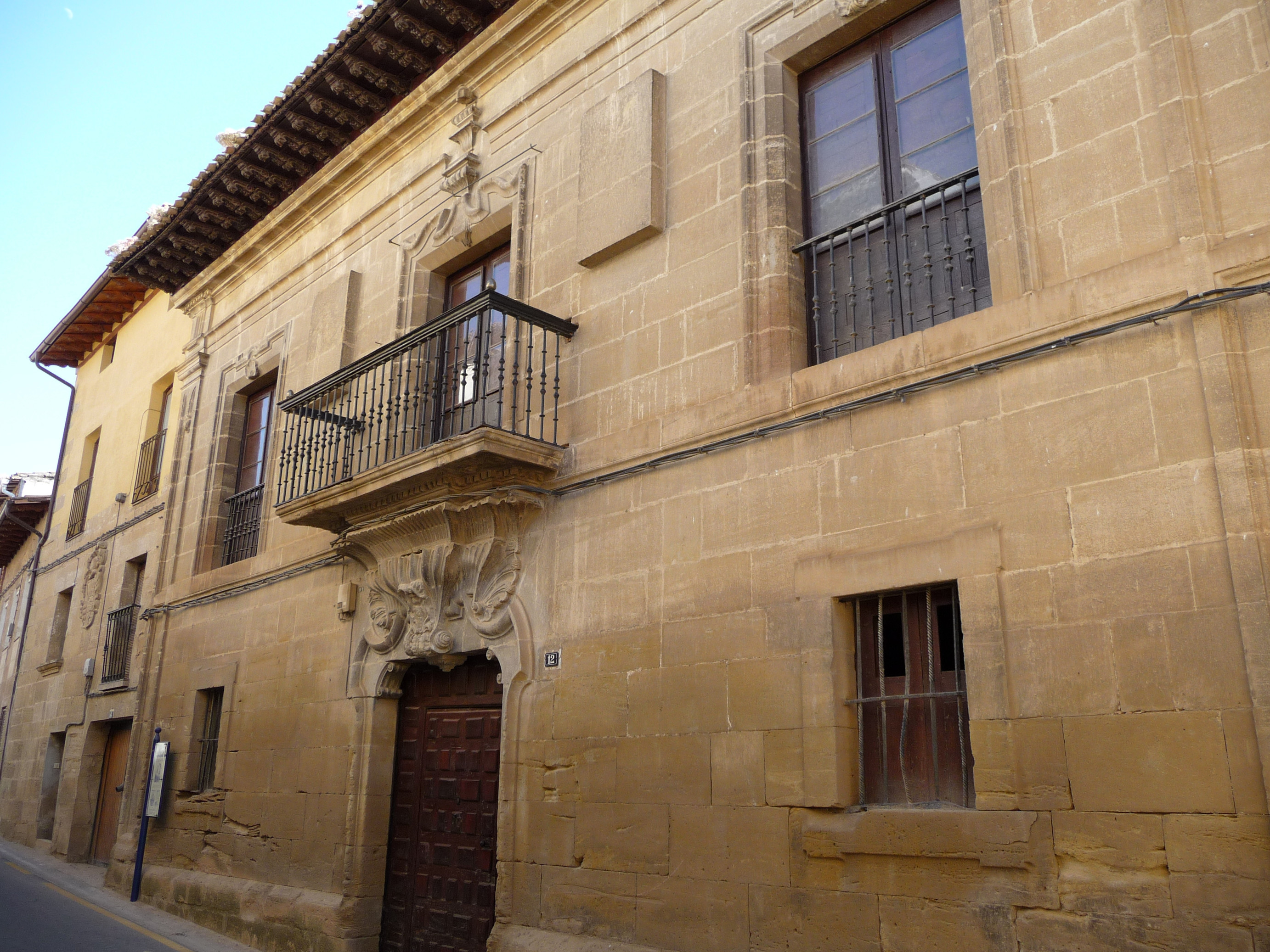 Casa de la calle José Iturmendi, 12. San Asensio en La Rioja (España)